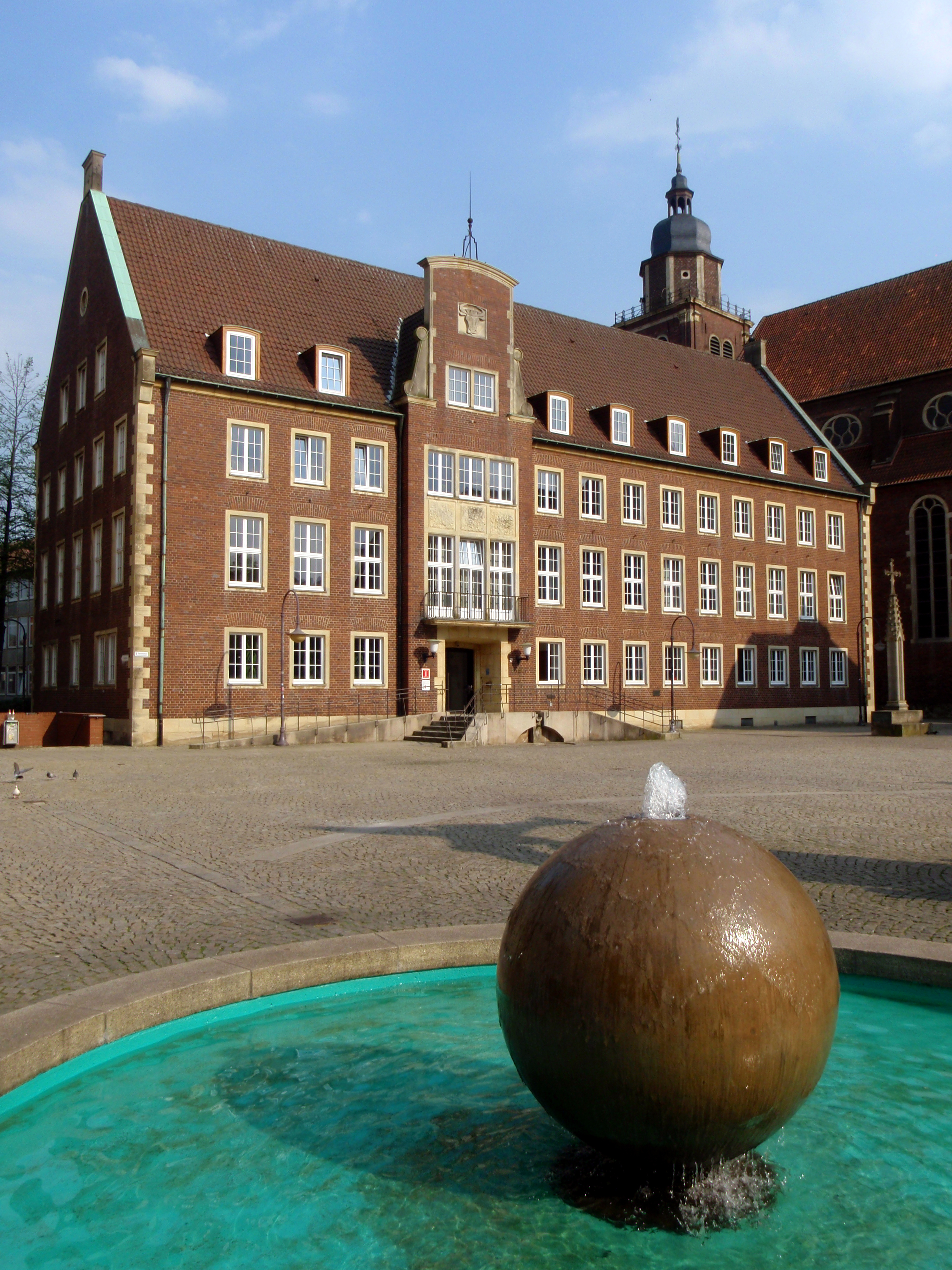 Das Rathaus im münsterländischen Coesfeld. This is a photograph of an architectural monument.